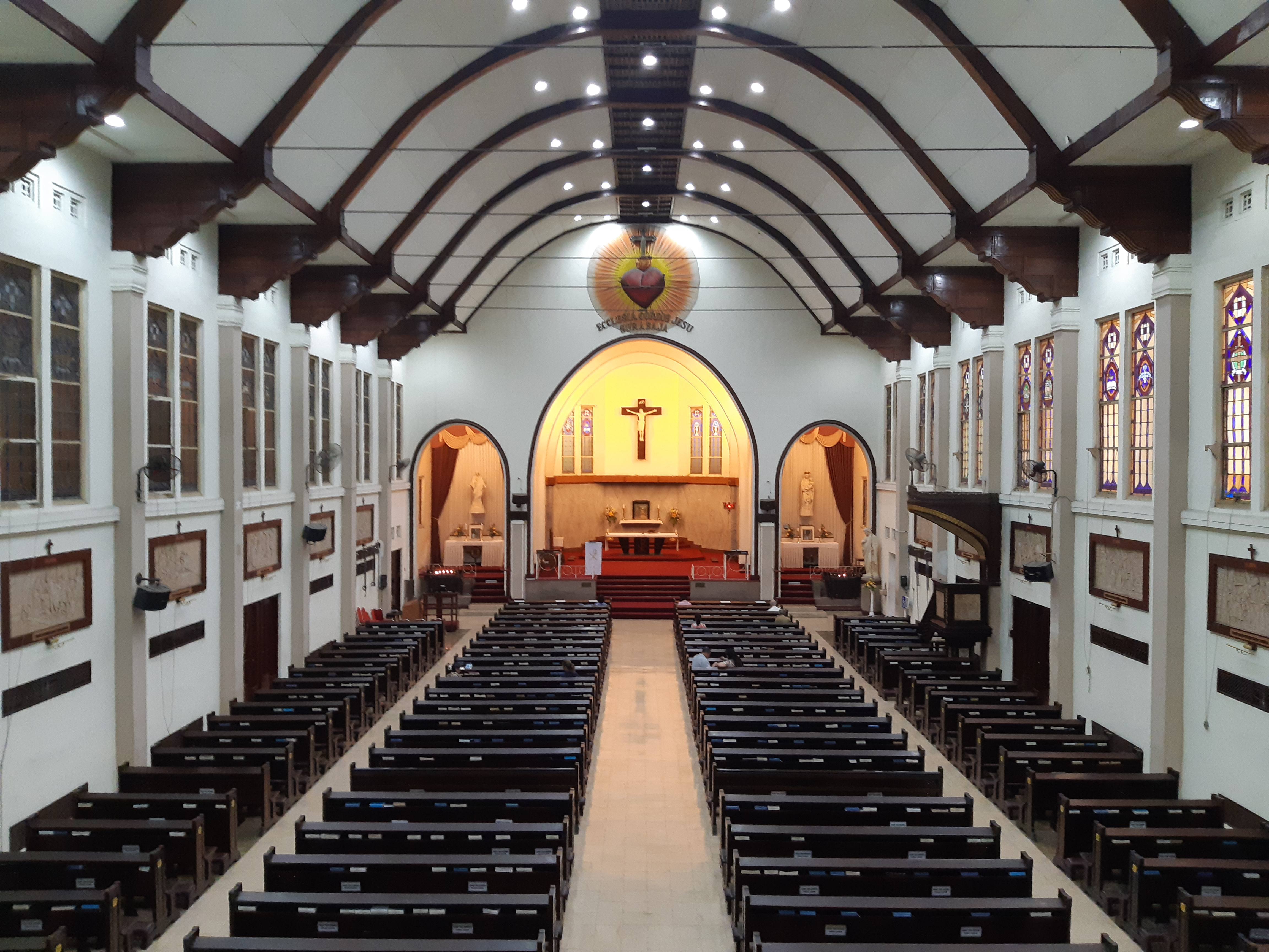 Tampak dalam Gereja Katedral Hati Kudus Yesus Surabaya